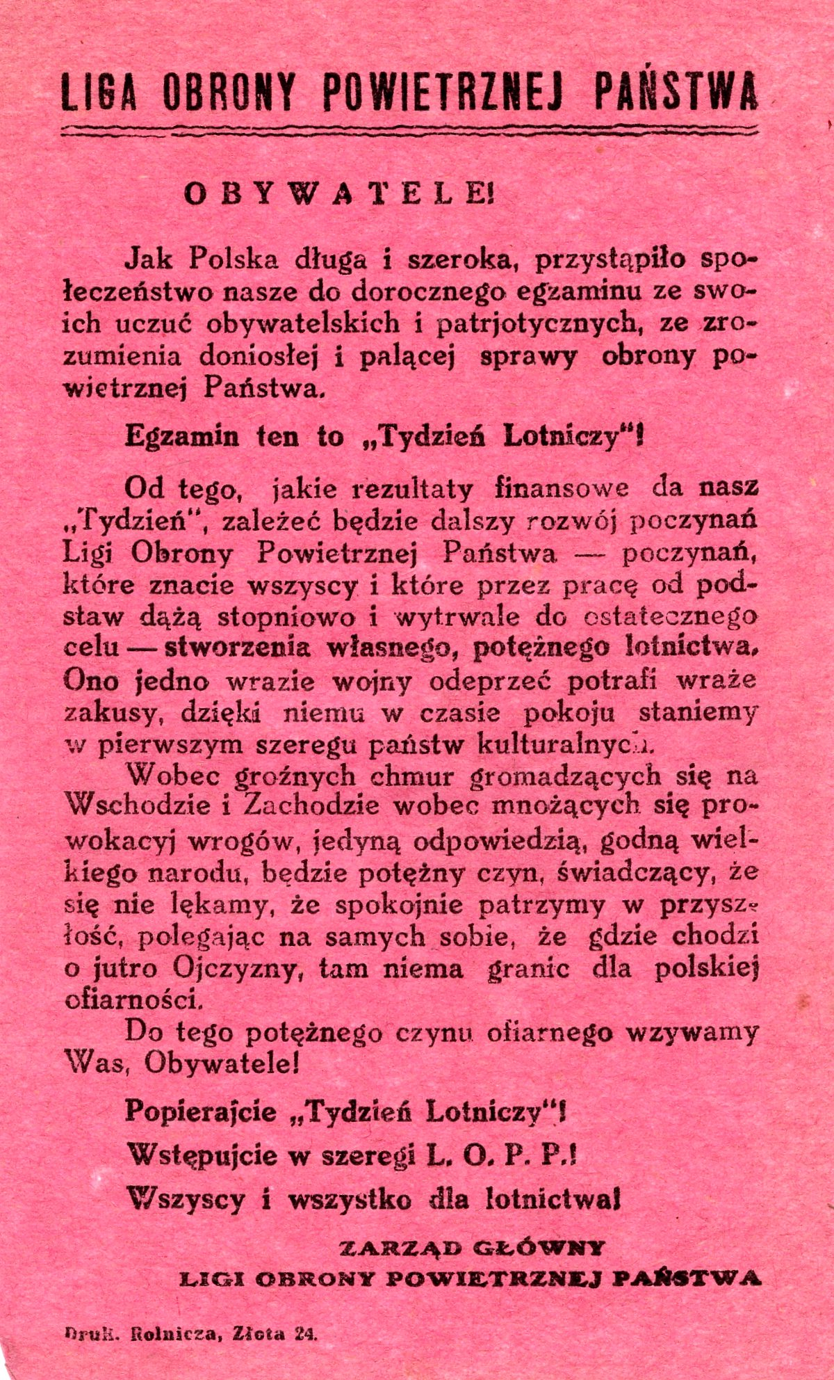 Advert by Liga Obrony Powietrznej (1923-1928).